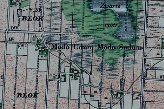 Fragment kaart omgeving Zwartemeer met het verdwenen Zwarte Meer